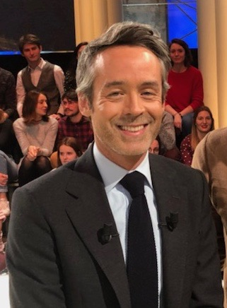 Yann Barthès sur le plateau de Quotidien en Janvier 2019.